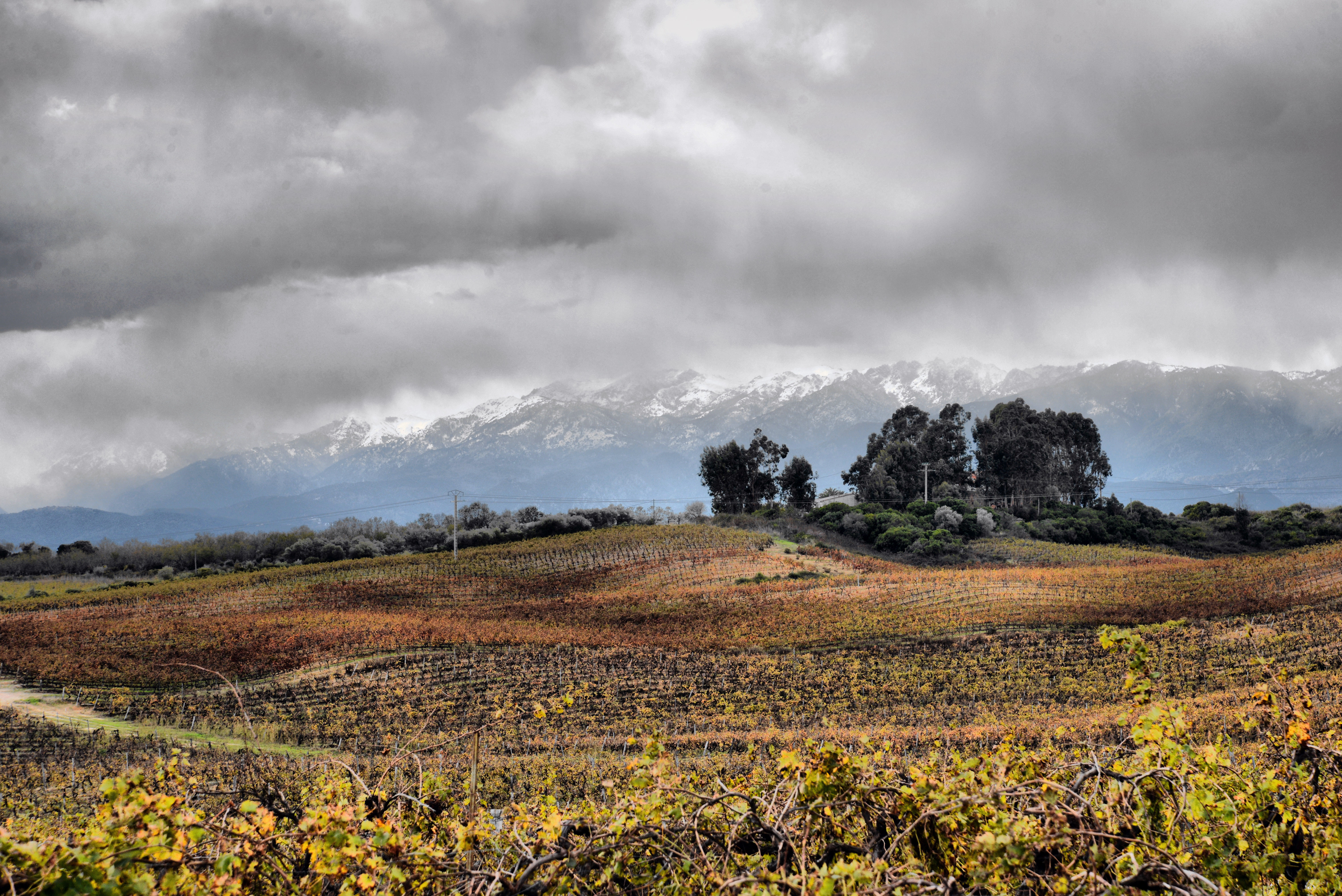 Tallone, Plaine Orientale (Corse) - Vignoble de la « Réserve du Président » dans la plaine, sur fond des crêtes enneigées du massif du Renoso